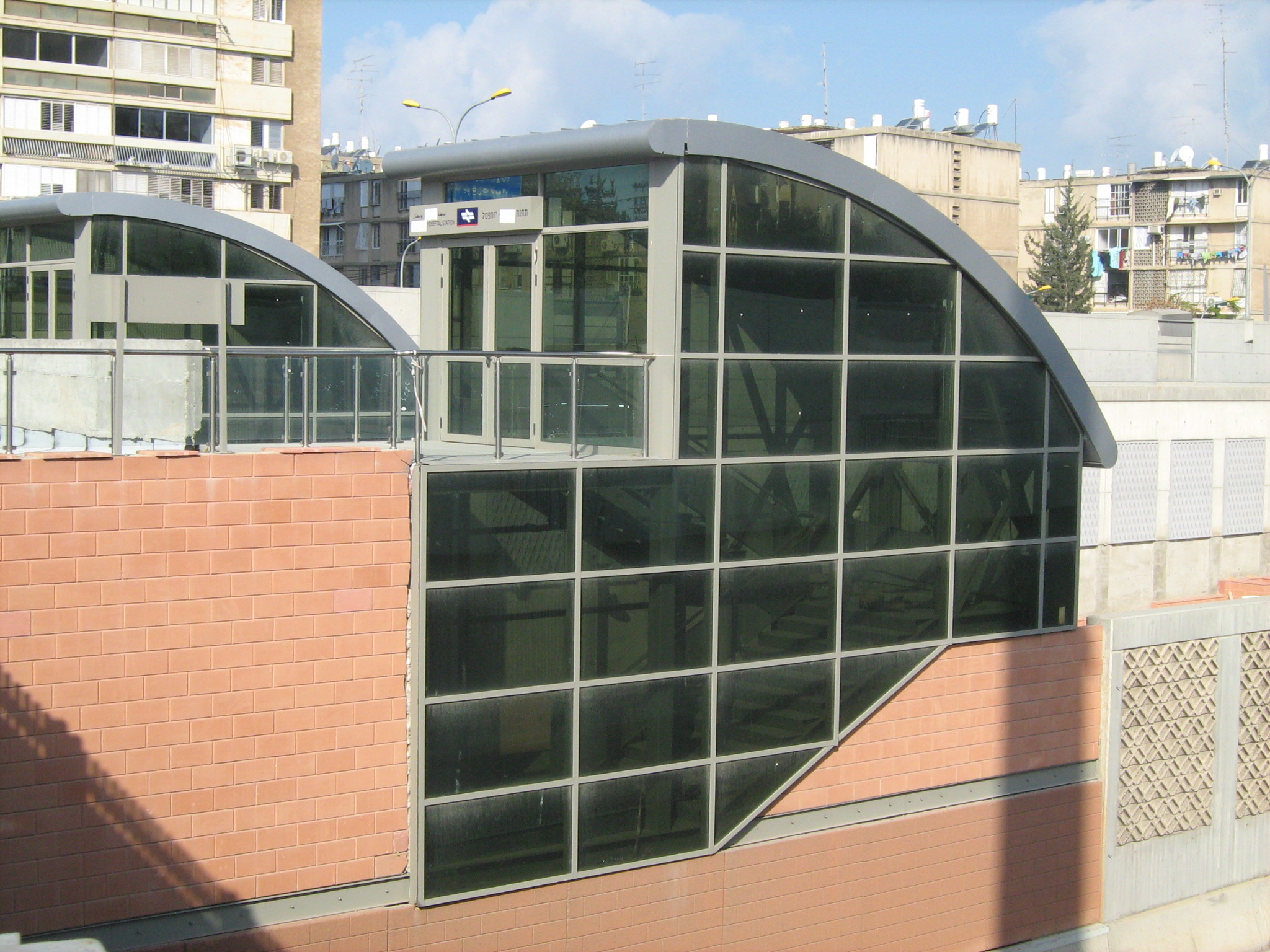 תחנת הרכבת יוספטל, פברואר 2009